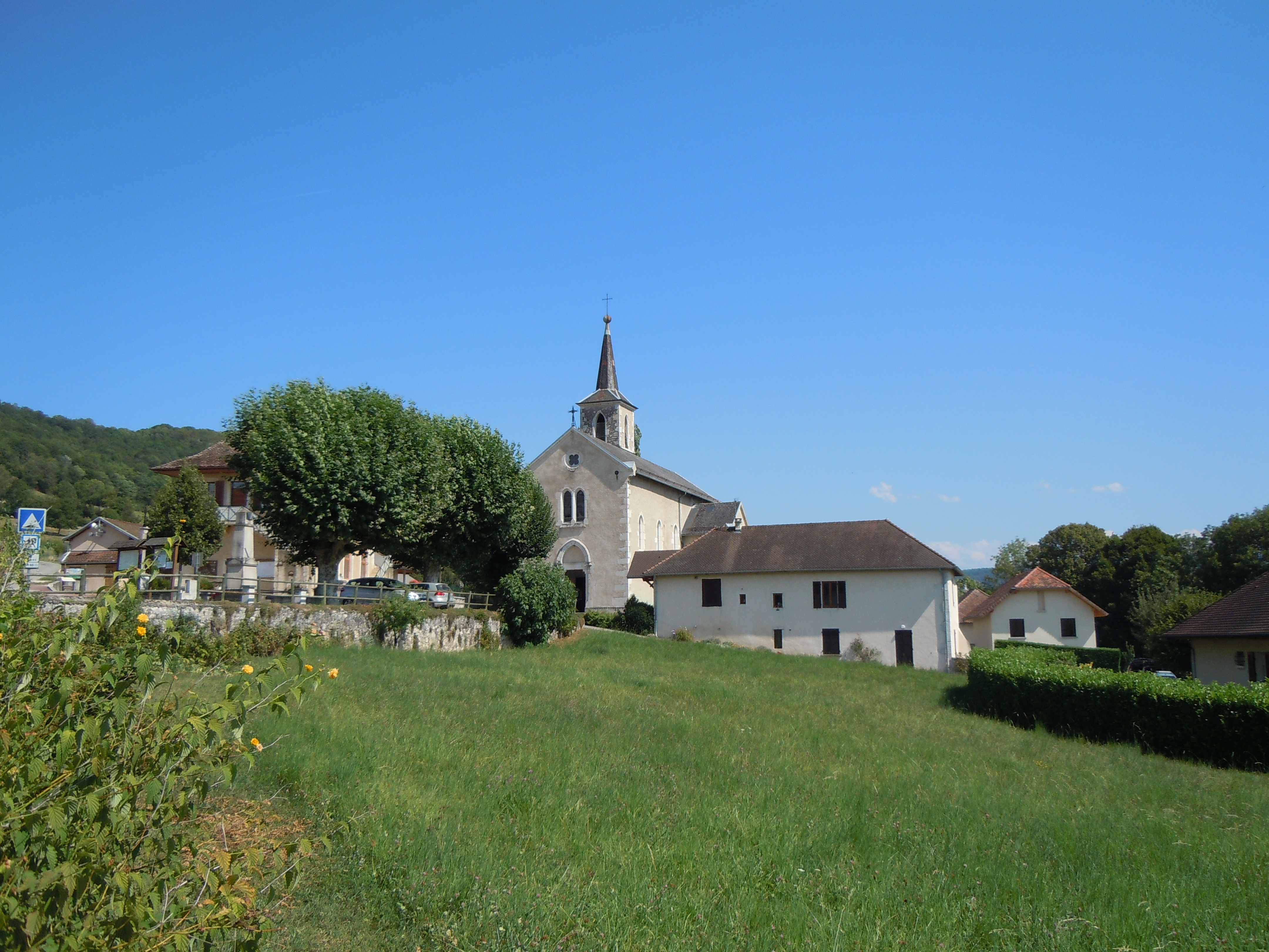 Gresin - Savoie - France